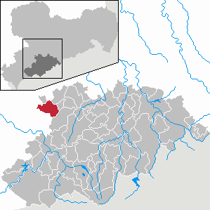 Oelsnitz/Erzgeb. im Erzgebirgskreis, Sachsen